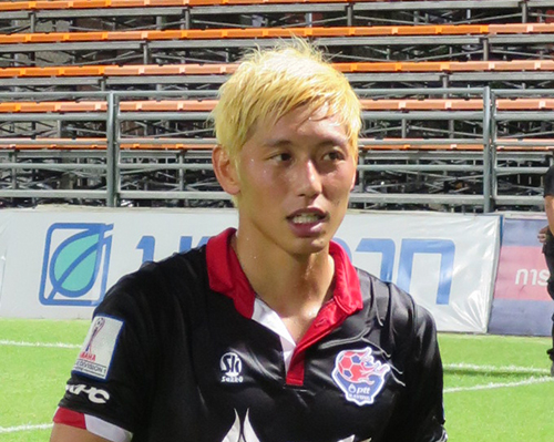 Goshi Okubo